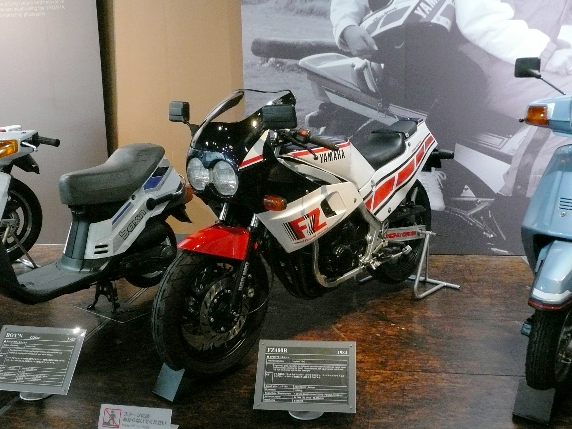 YAMAHA FZ400R 1984、ヤマハコミュニケーションプラザにて撮影